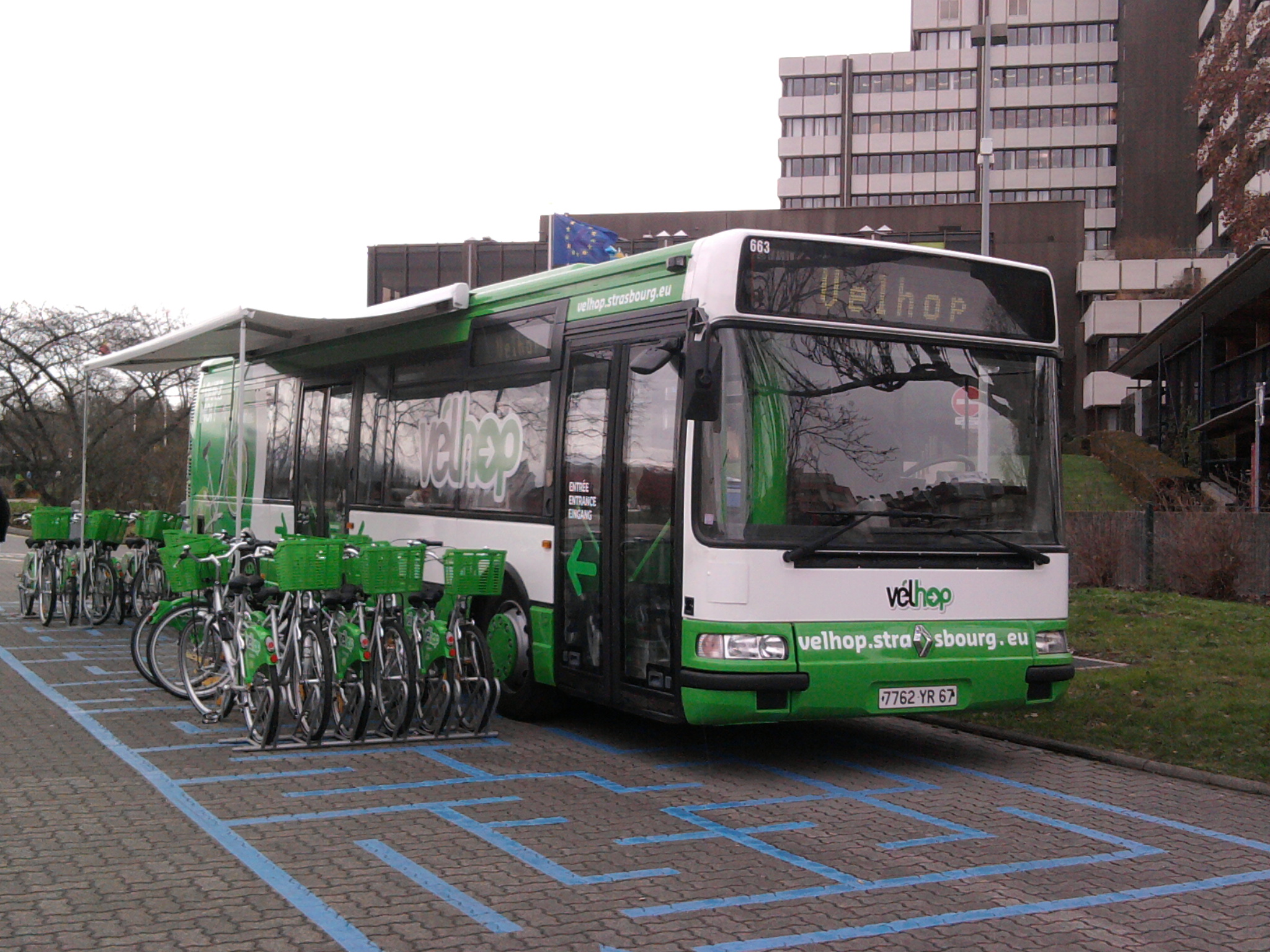 Un bus Velhop (Renault Agora S) à Etoile Bourse, Strasbourg